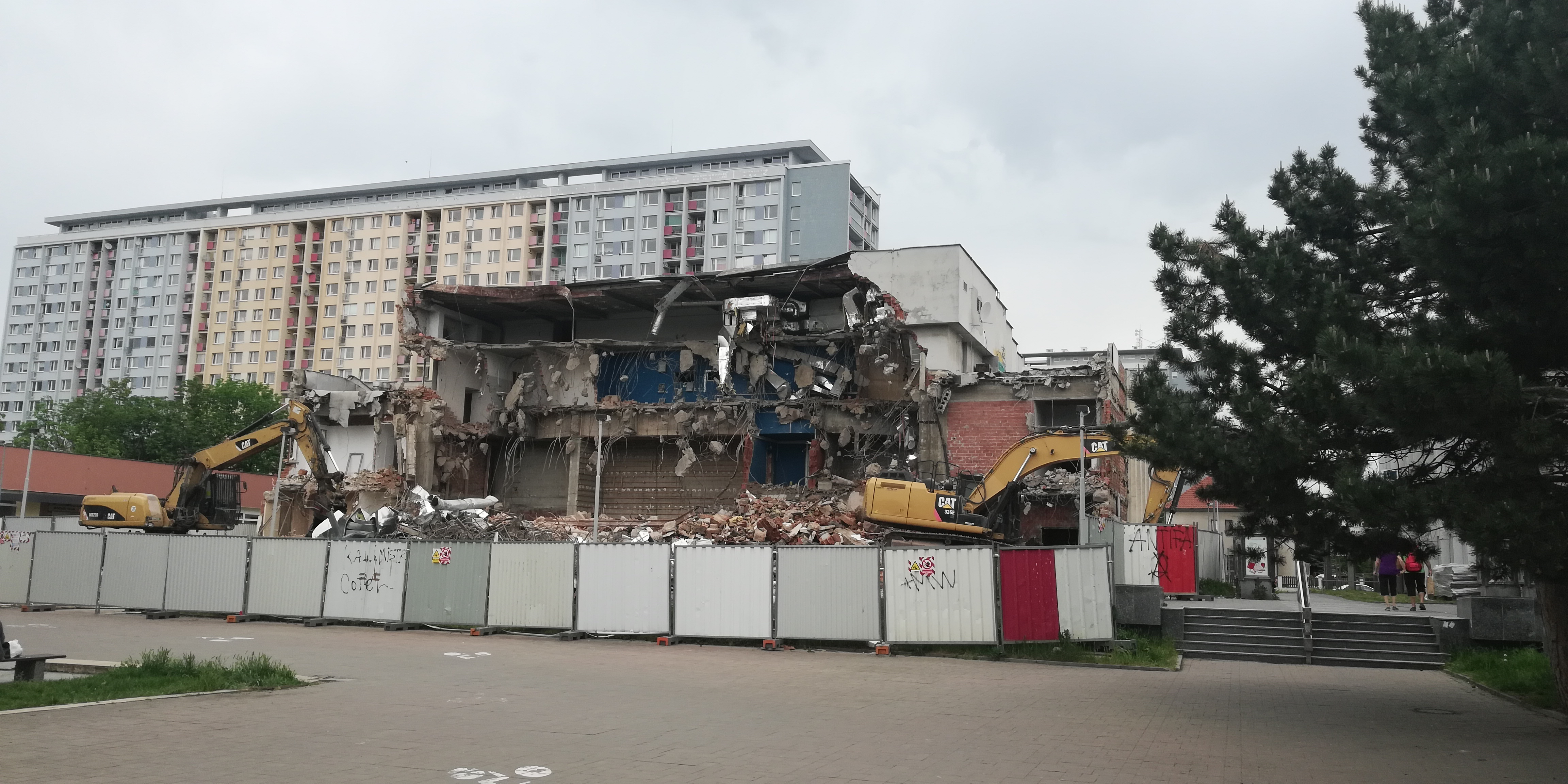 Kino Ládví během demolice započaté v květnu 2020. Burešova 1662/4, Binarova 1662, Praha 8-Kobylisy.